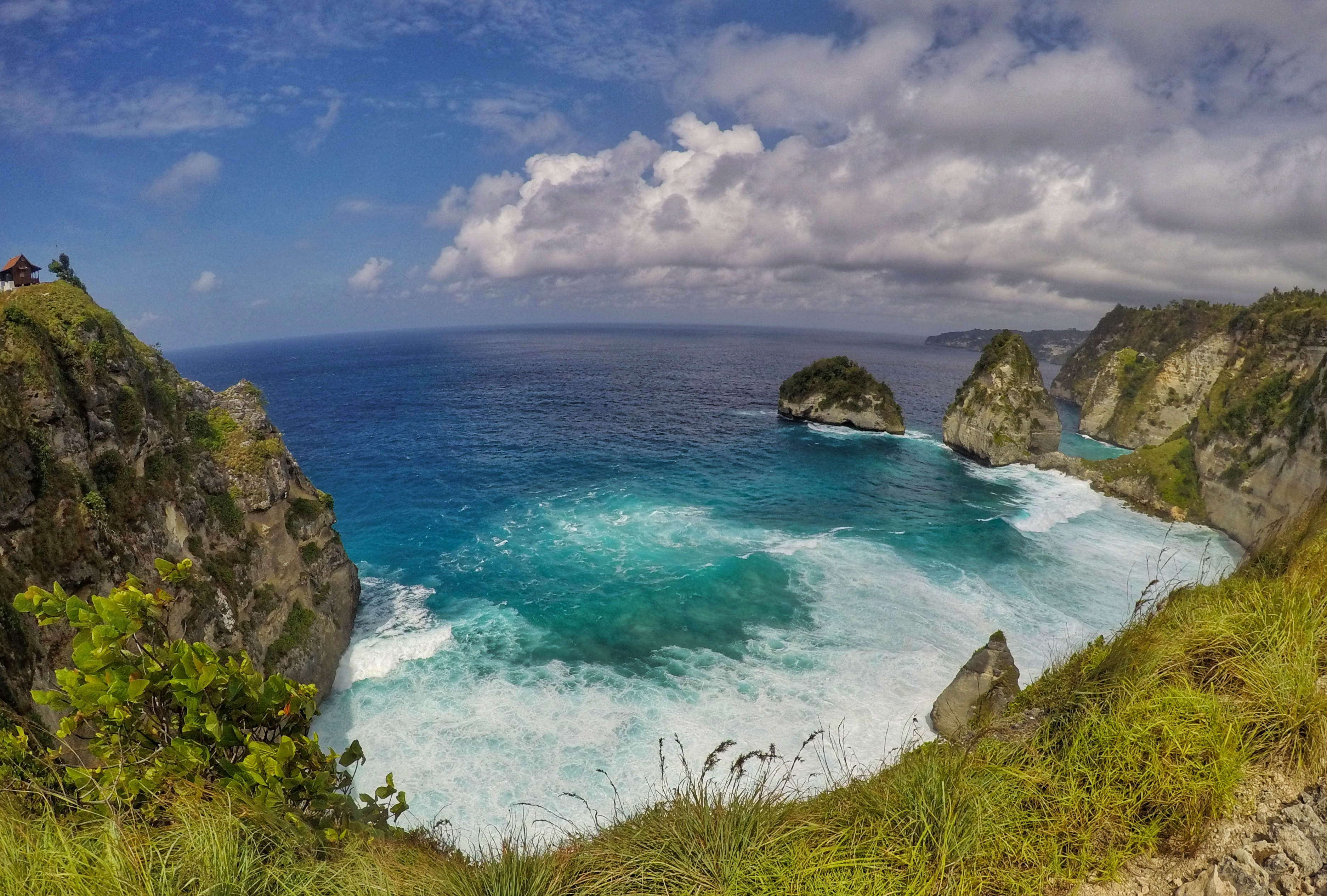 Pantai Atuh terletak di sisi selatan pulau Nusa Penida. Horison pantai ini berbatasan langsung dengan Samudra Hindia.